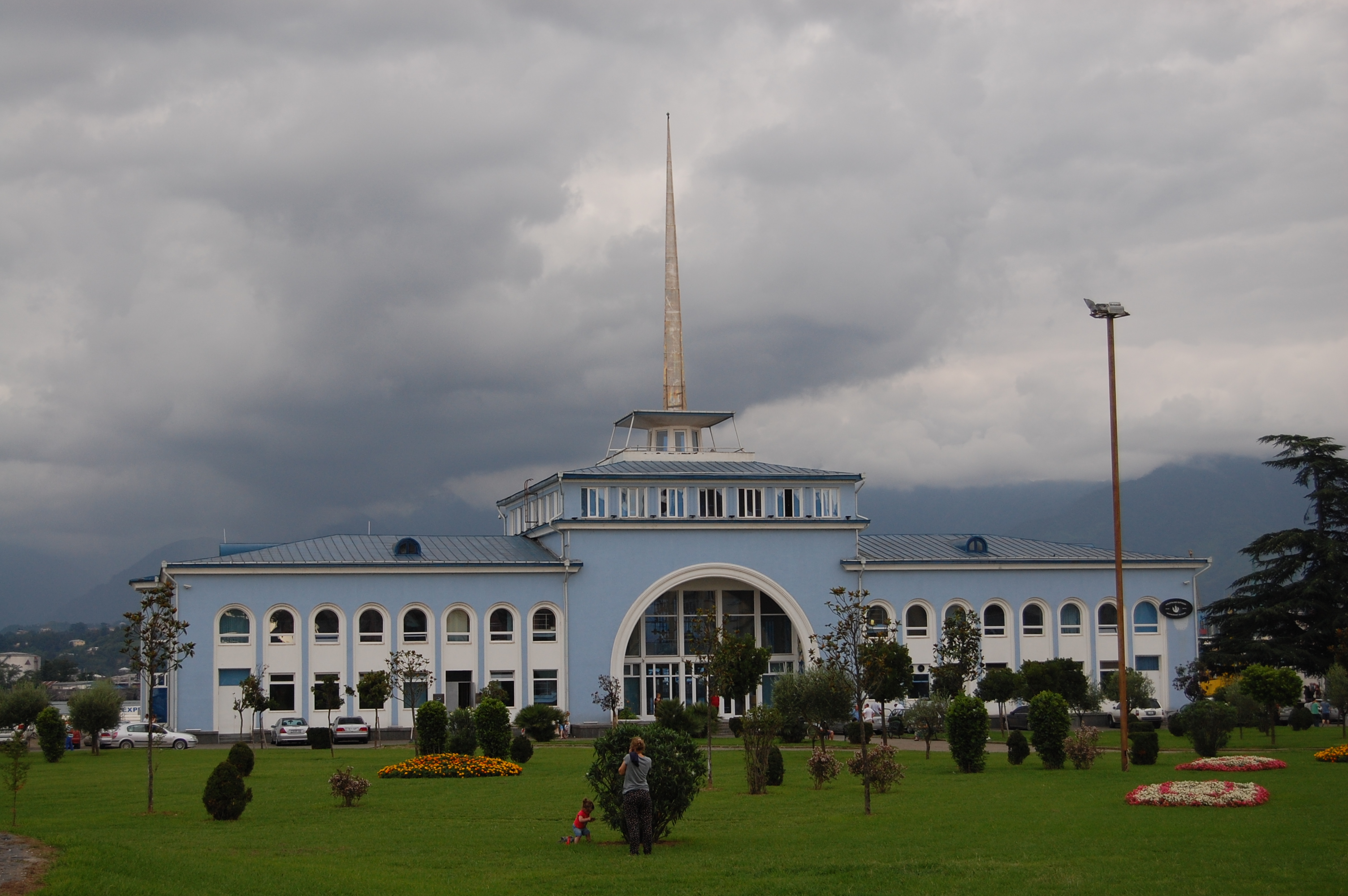 Batumi - Marine Station Georgia - Sakartvelo